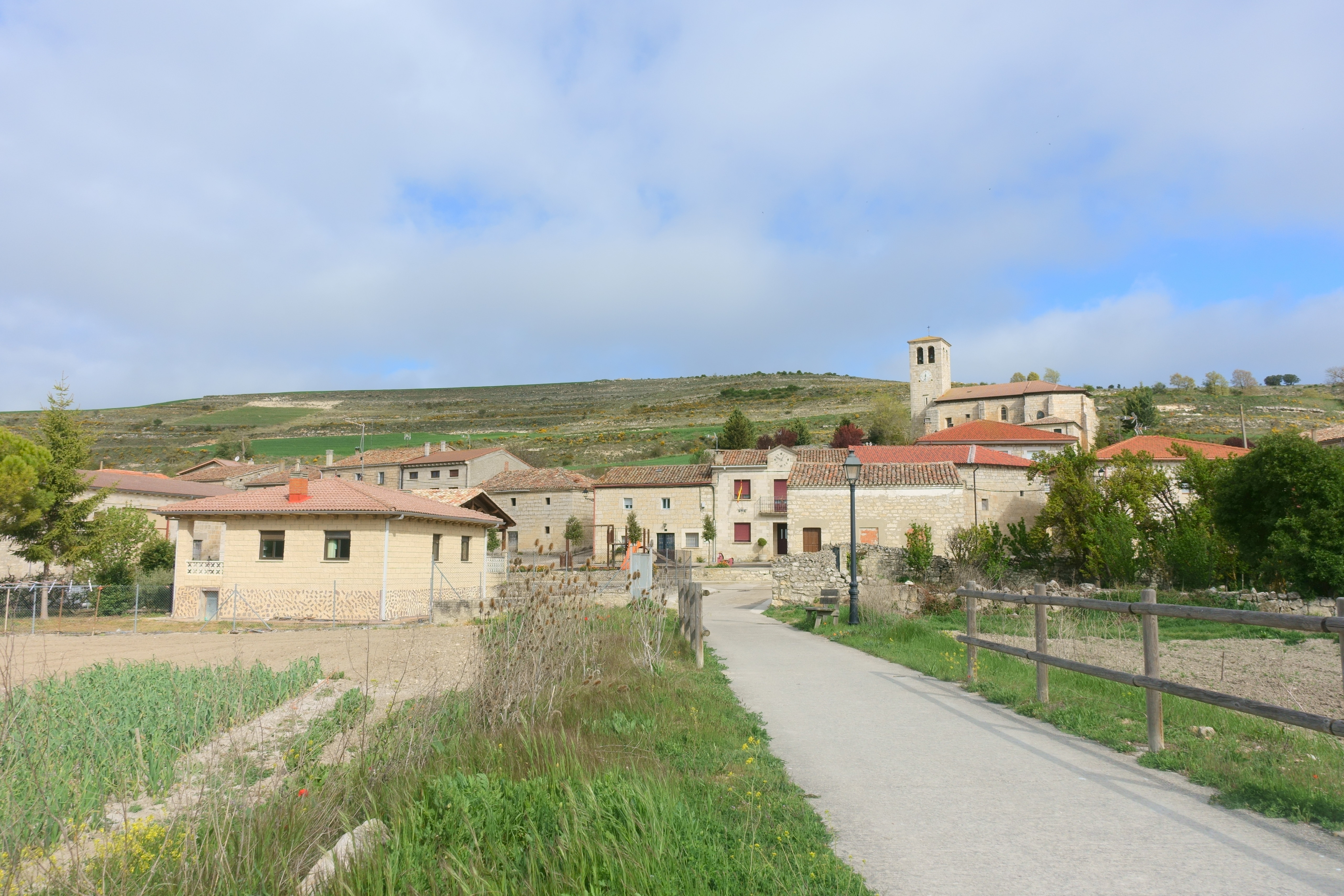 Vista de Susinos del Páramo (Burgos, España).